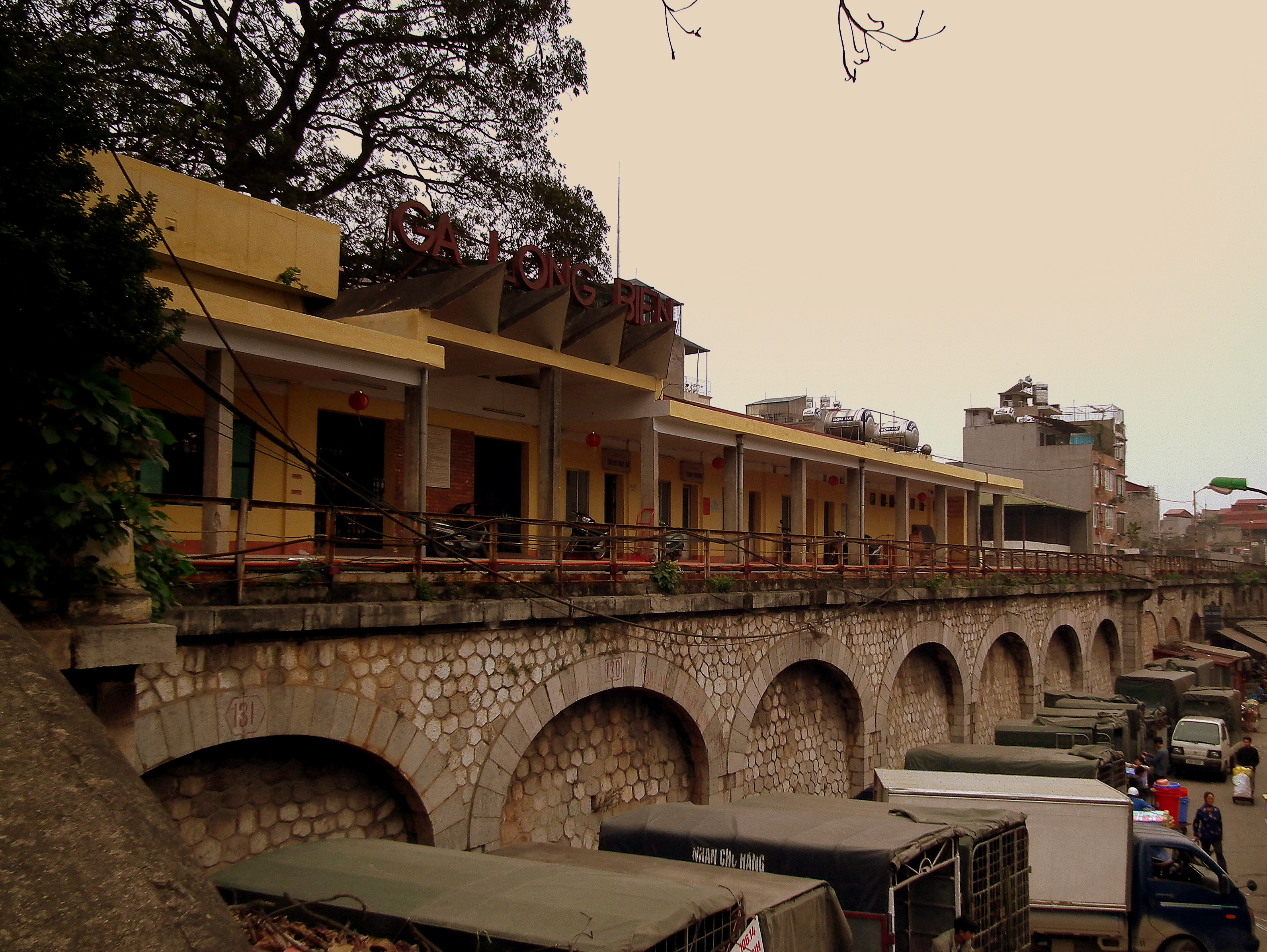 GA LONG BIEN HA NOI VIETNAM FEB 2012